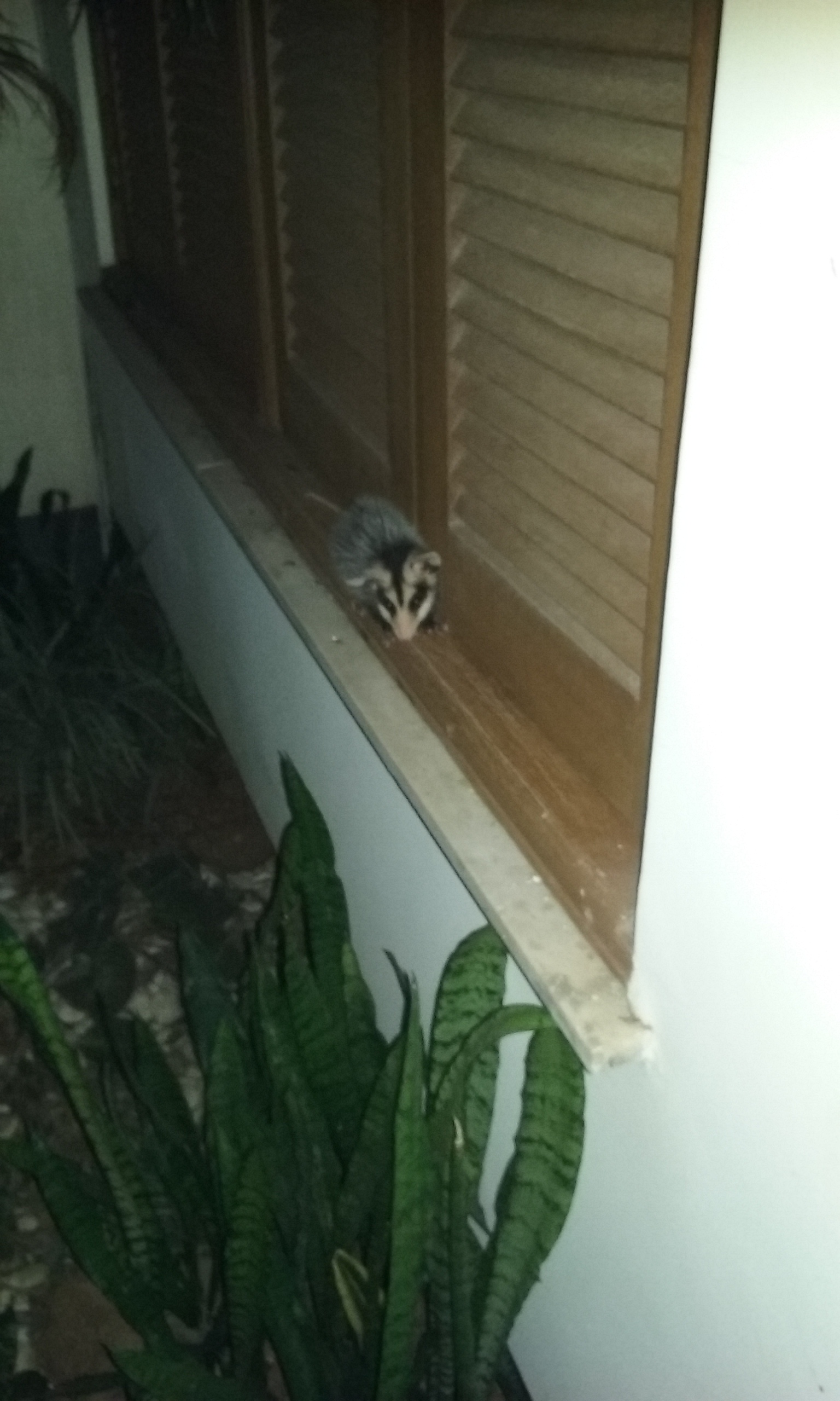 Filhote de raposa brasileira 2